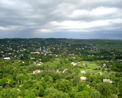 Vedere generală asupra Rădășenilor